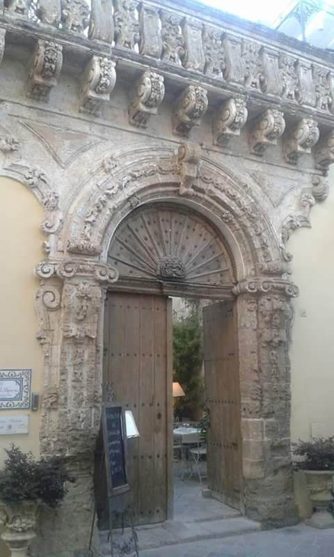 Portale Palazzo Il Mignano a Nardò (LE)-PUGLIA-ITALY